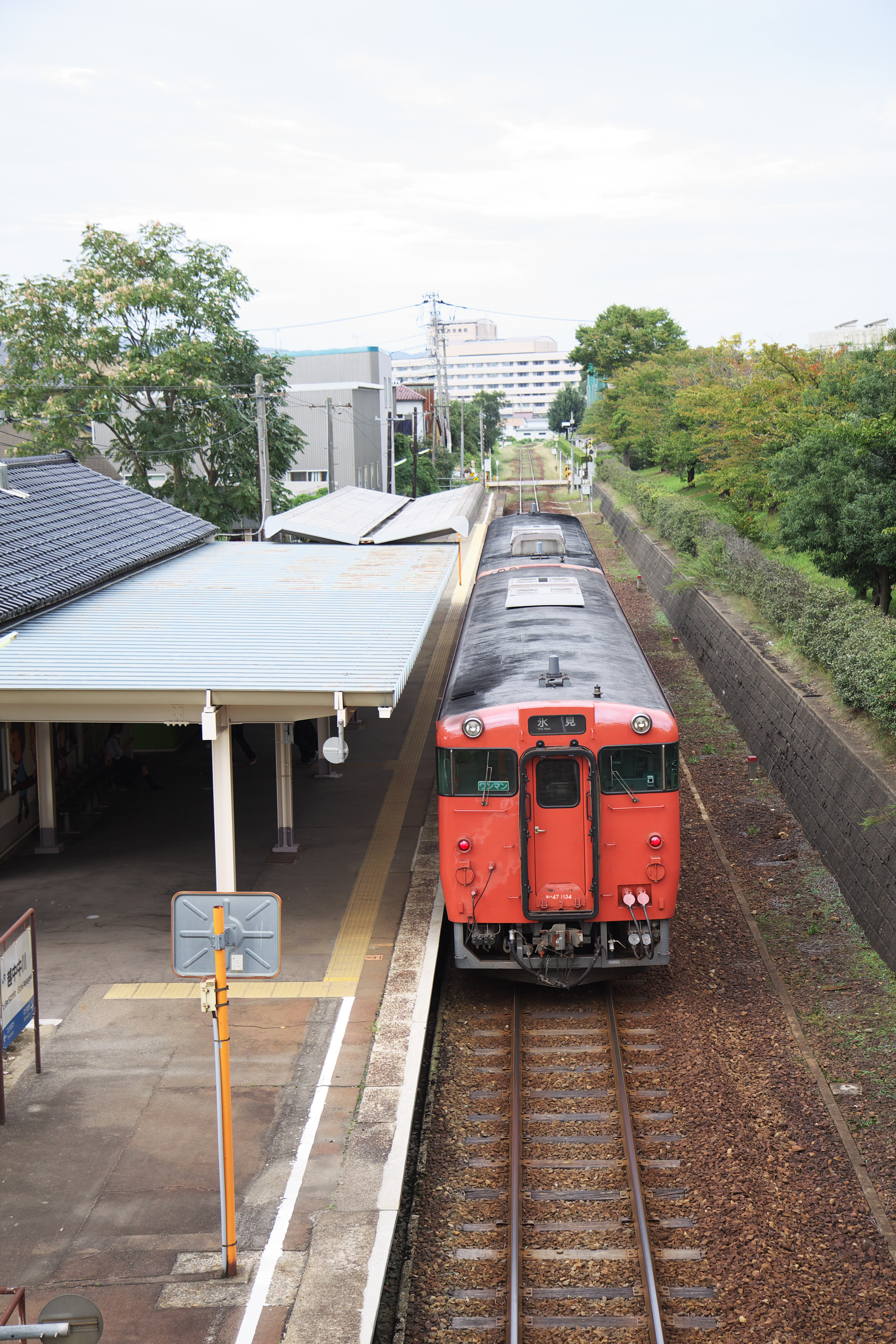 氷見線越中中川駅